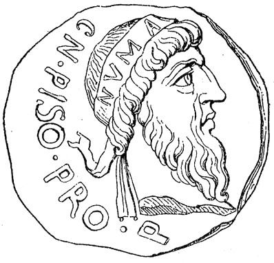 Numa Pompilius, romersk kung. Källa: Anton Nyström, Allmän kulturhistoria eller det mänskliga lifvet i dess utveckling, bd 2 (1901)